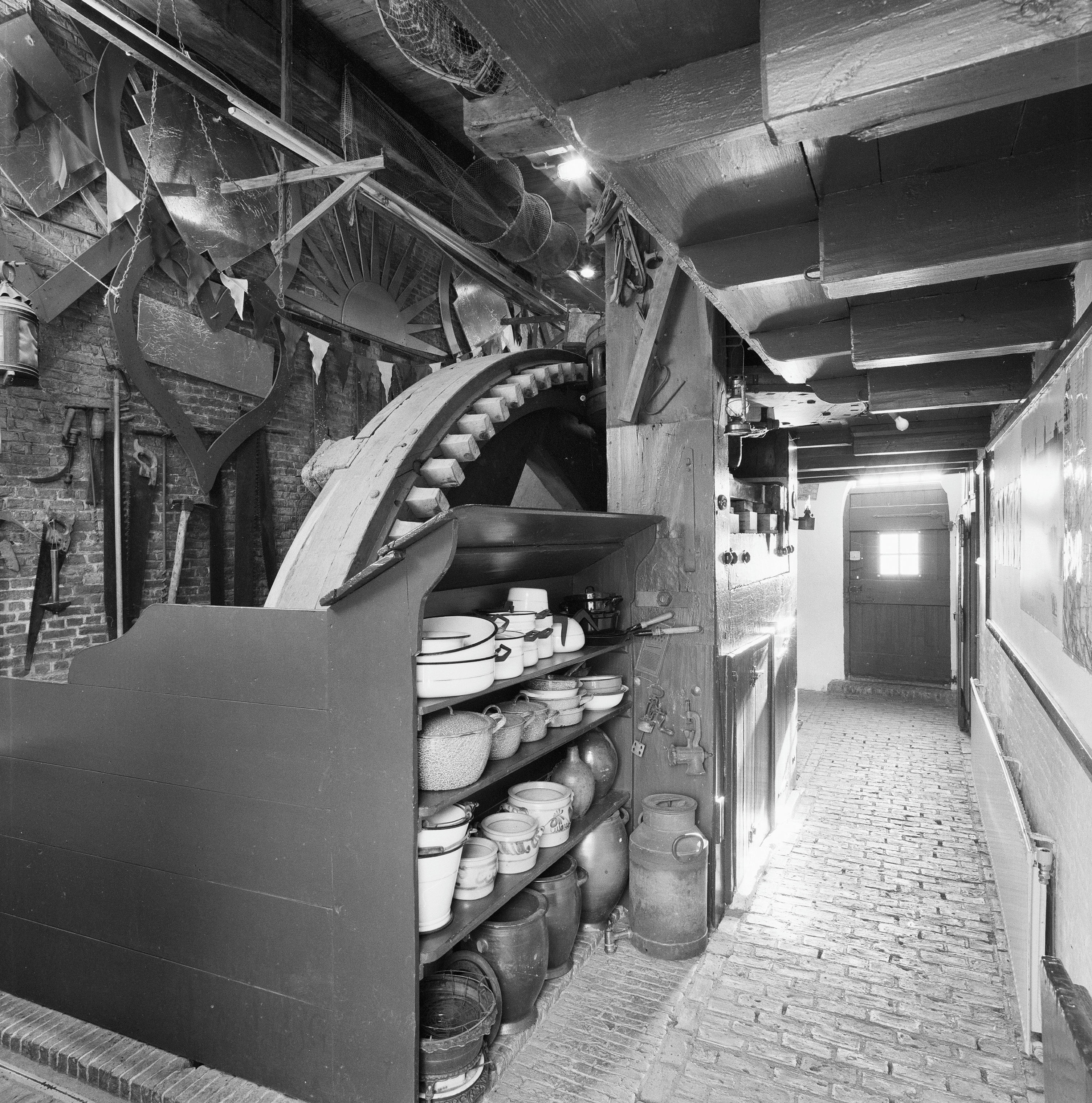 Nederwaard Molen no: 2 (bezoekmolen): Interieur van de bezoekmolen te Kinderdijk met gang van de begane grond en zicht op onderwiel (opmerking: Gefotografeerd voor plaatsing op de Werelderfgoedlijst)